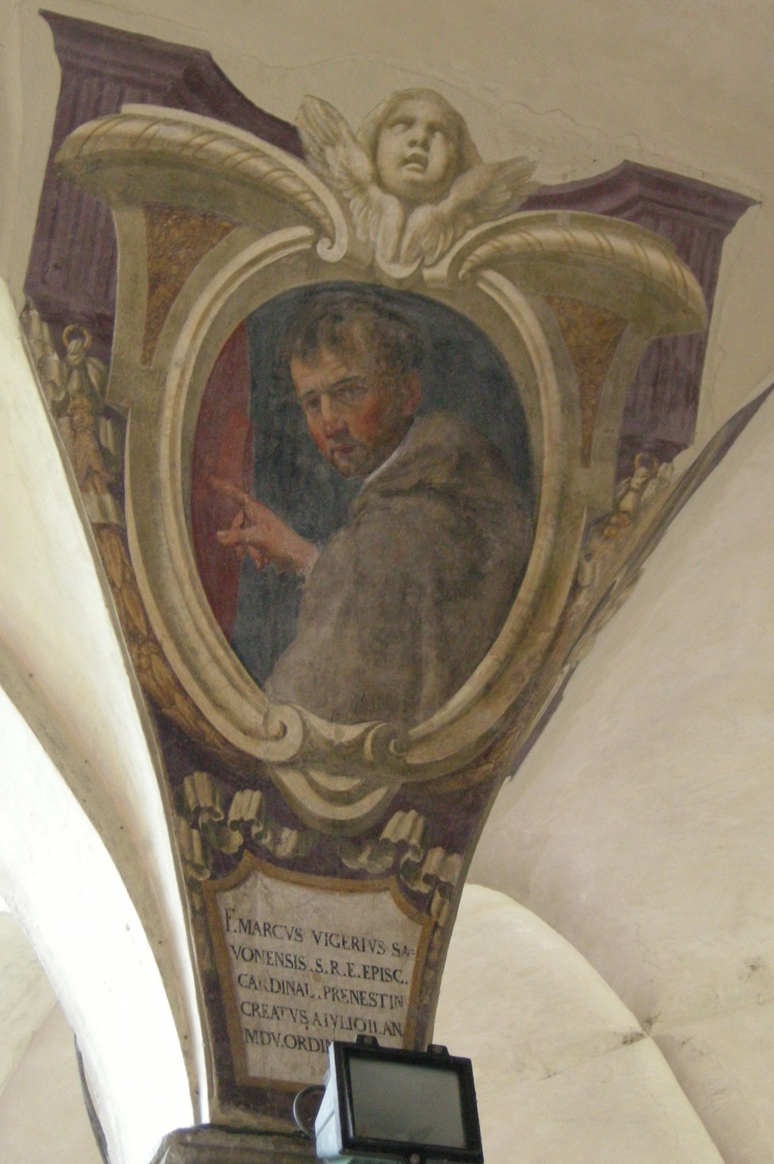 Chiostro di ognissanti, personalità francescane 42 Marco Vigerio della Rovere